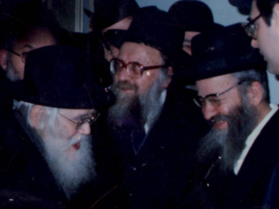 הרב מרדכי מן עם הרב שך והרב מ.ש. שפירא